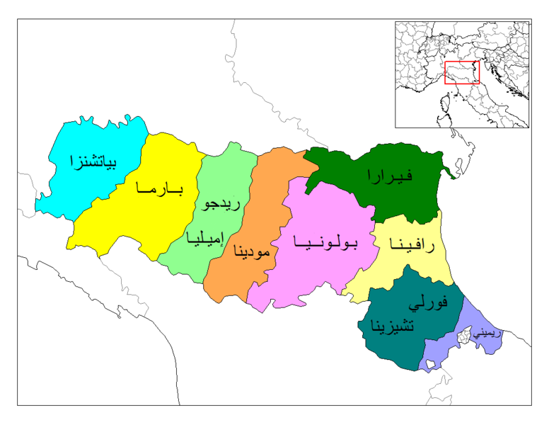 خريطة إقليم إميليا رومانيا بالعربية